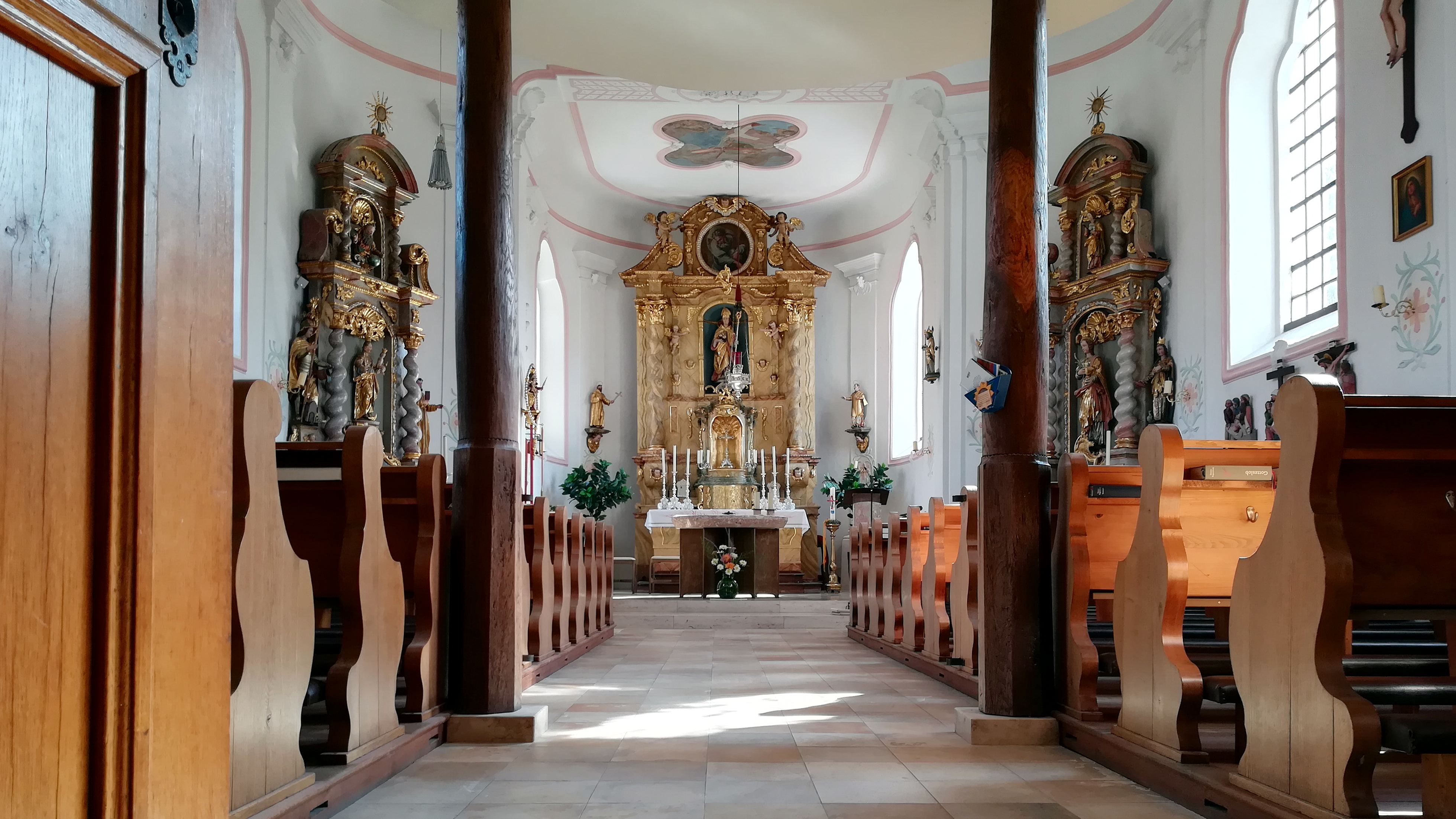 Katholische Pfarrkirche St. Nikolaus in Attenhofen